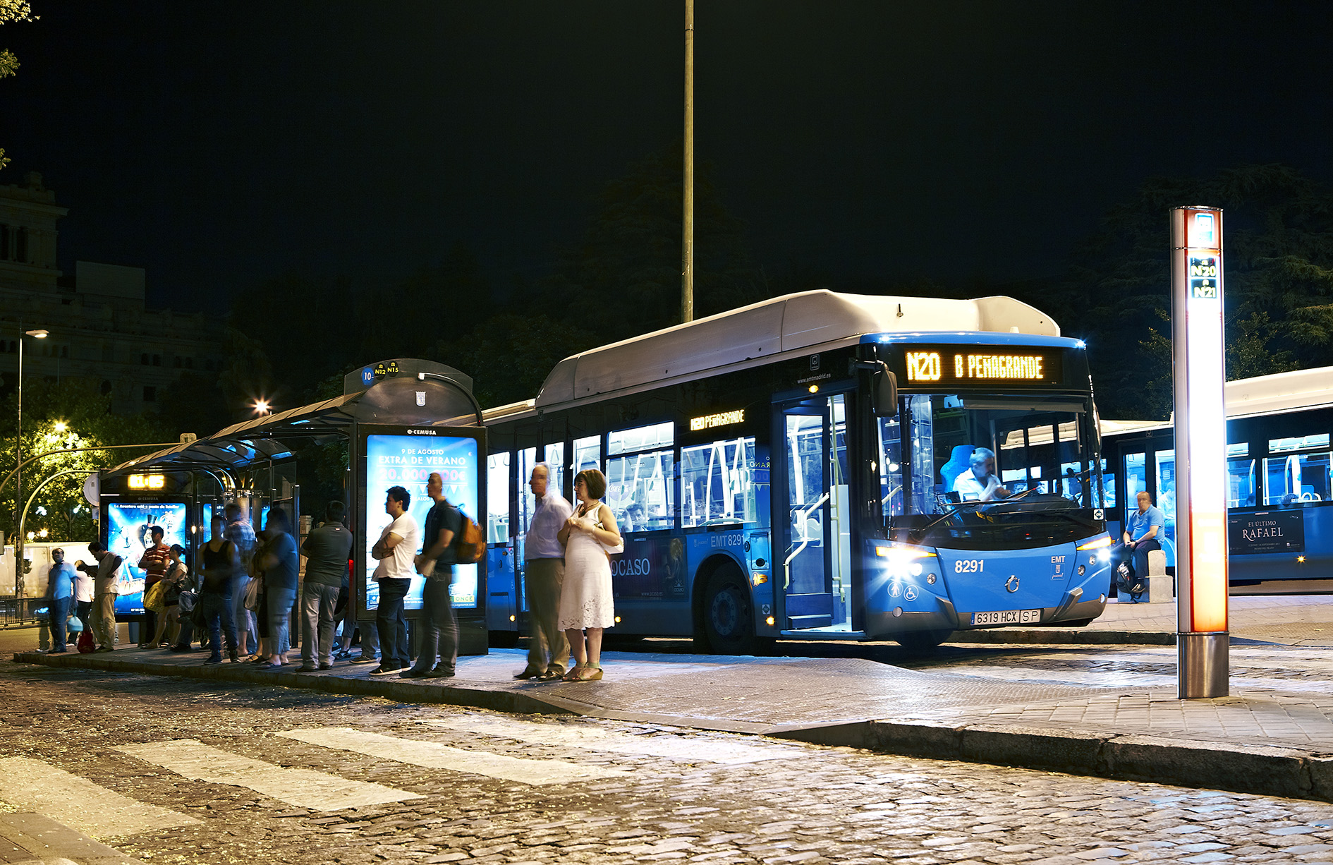 Durante las próximas semanas, el servicio de la Empresa Municipal de Transportes (EMT) va a experimentar numerosas novedades y mejoras que beneficiarán a los vecinos y usuarios de numerosos barrios de la ciudad.